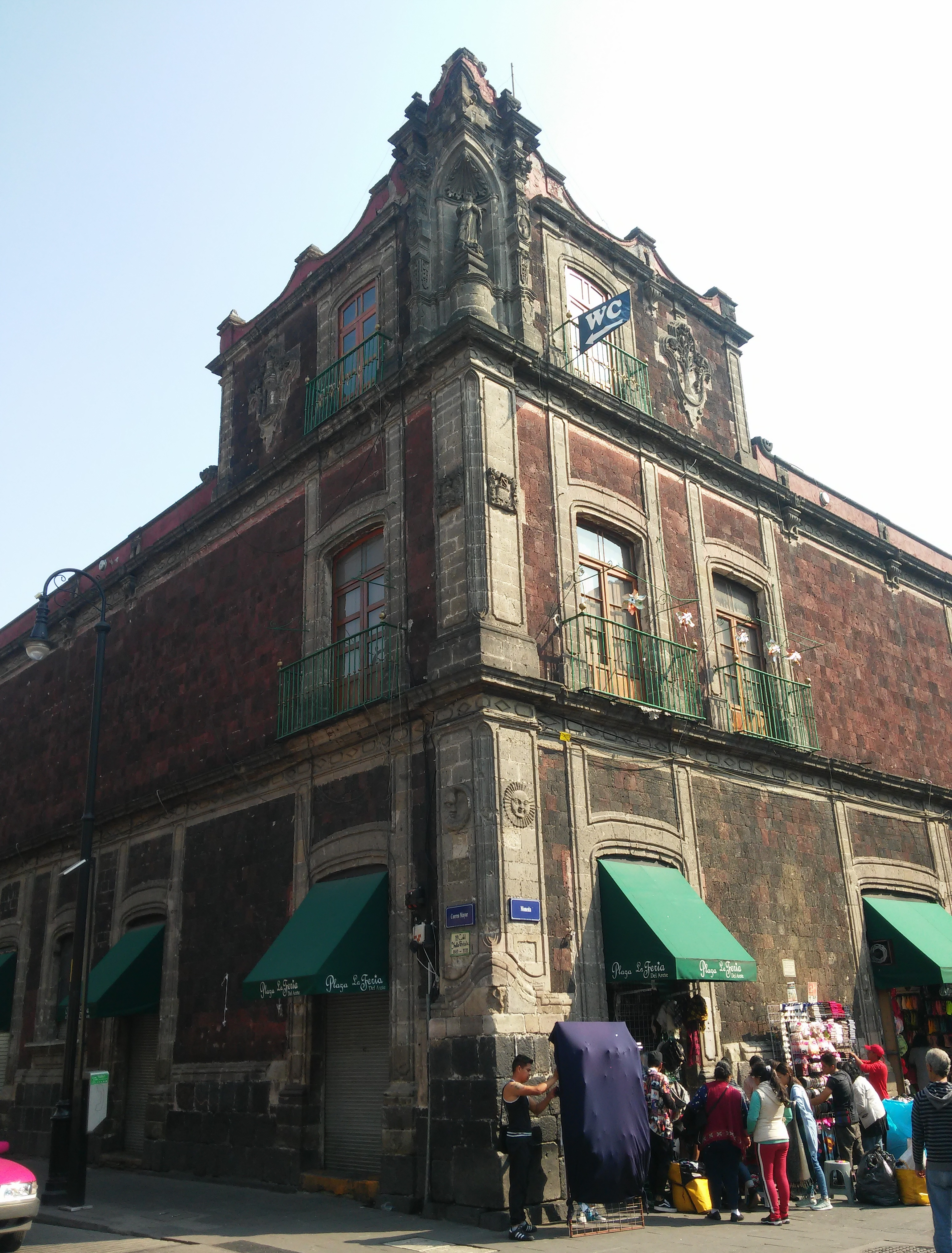 Casa menor del Mayorazgo de Guerrero en Moneda 18,20 y 22 en el centro histórico de la Ciudad de México